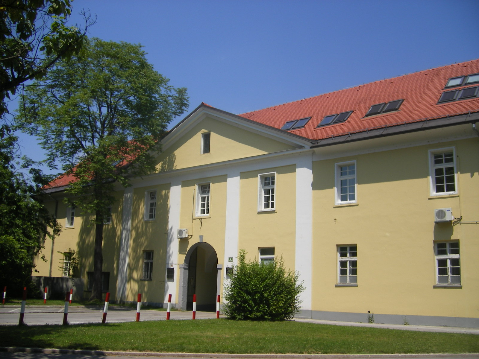 Ljubljana - Hospital